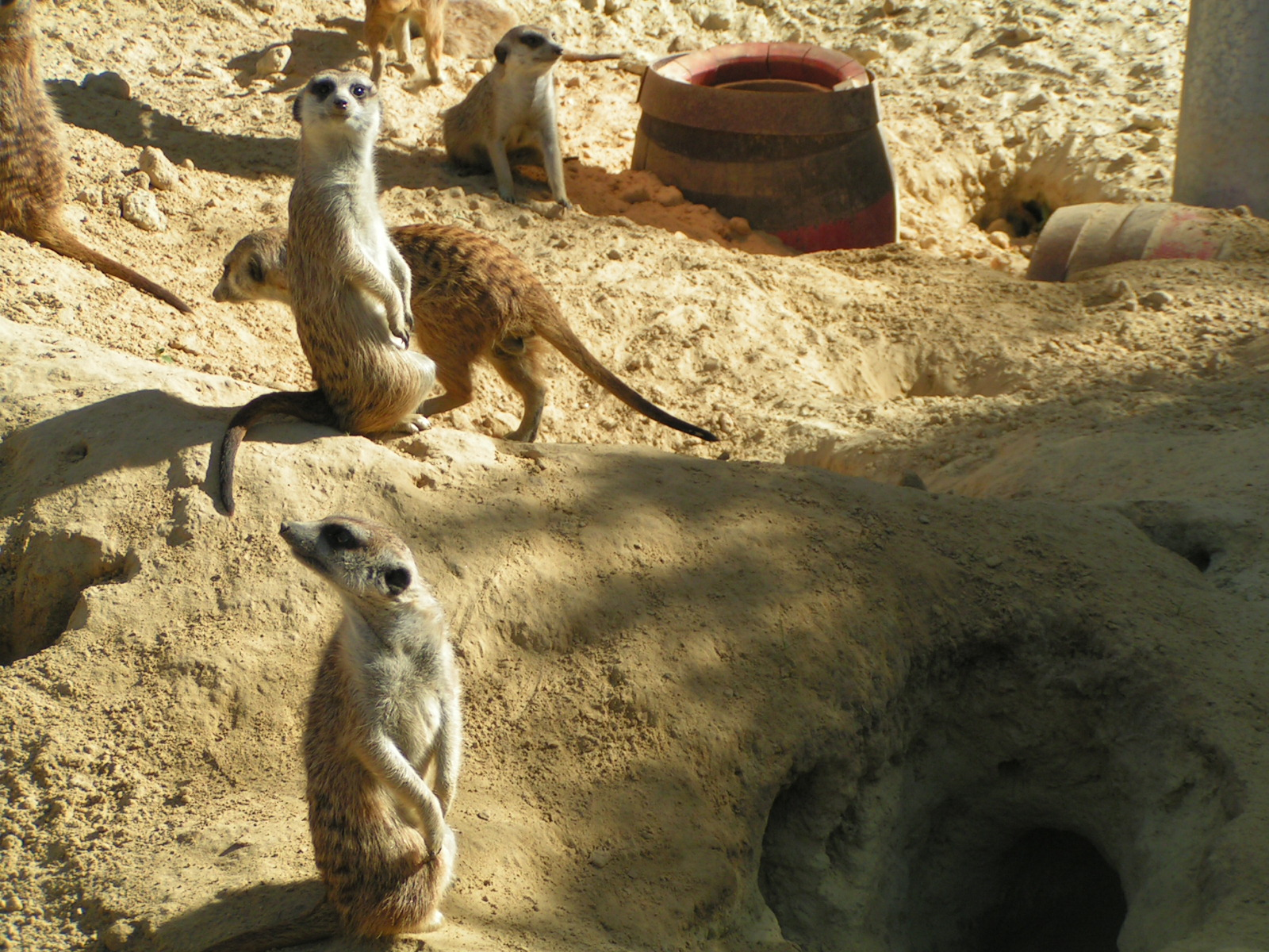 Сурикати, снимани в зоопарка в Кьолн. © 2004 Borislav Manolov